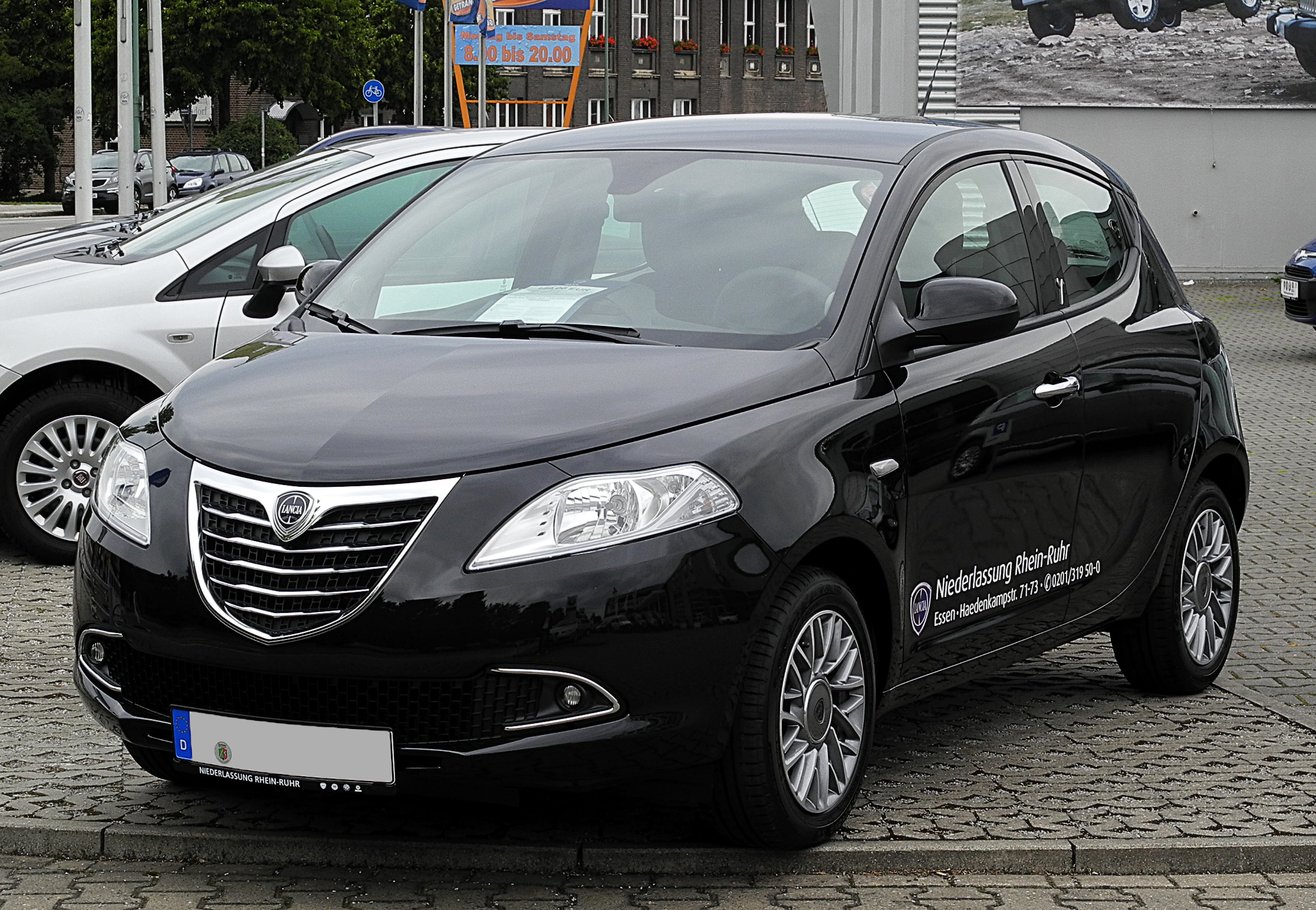 Lancia Ypsilon 1.2 8V Gold (II)